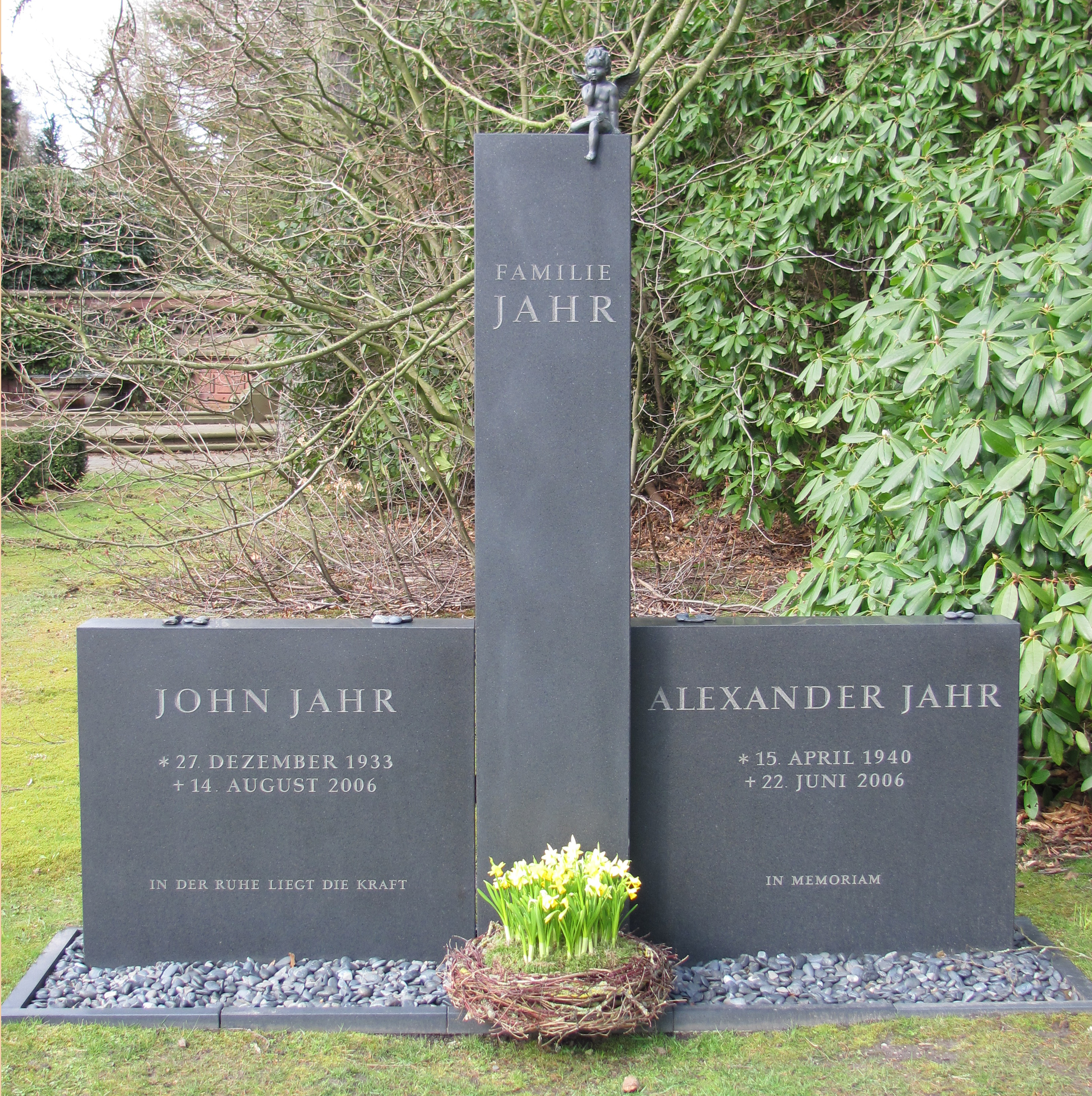 Familiengrab Jahr (John und Alexander) auf dem Ohlsdorfer Friedhof